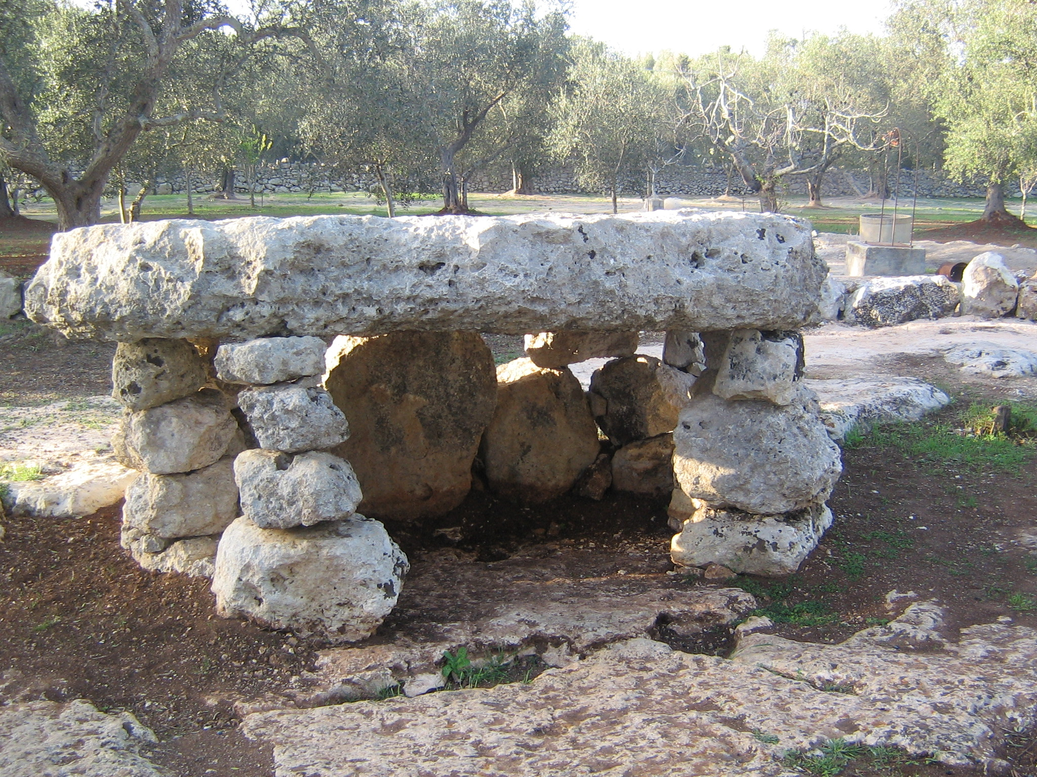 Categoria:Immagini esclusivamente in GNU FDL